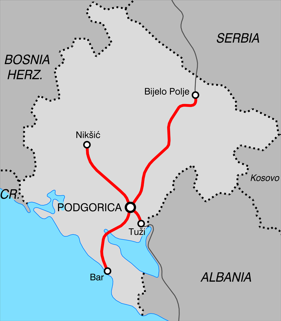 Railway map of Montenegro